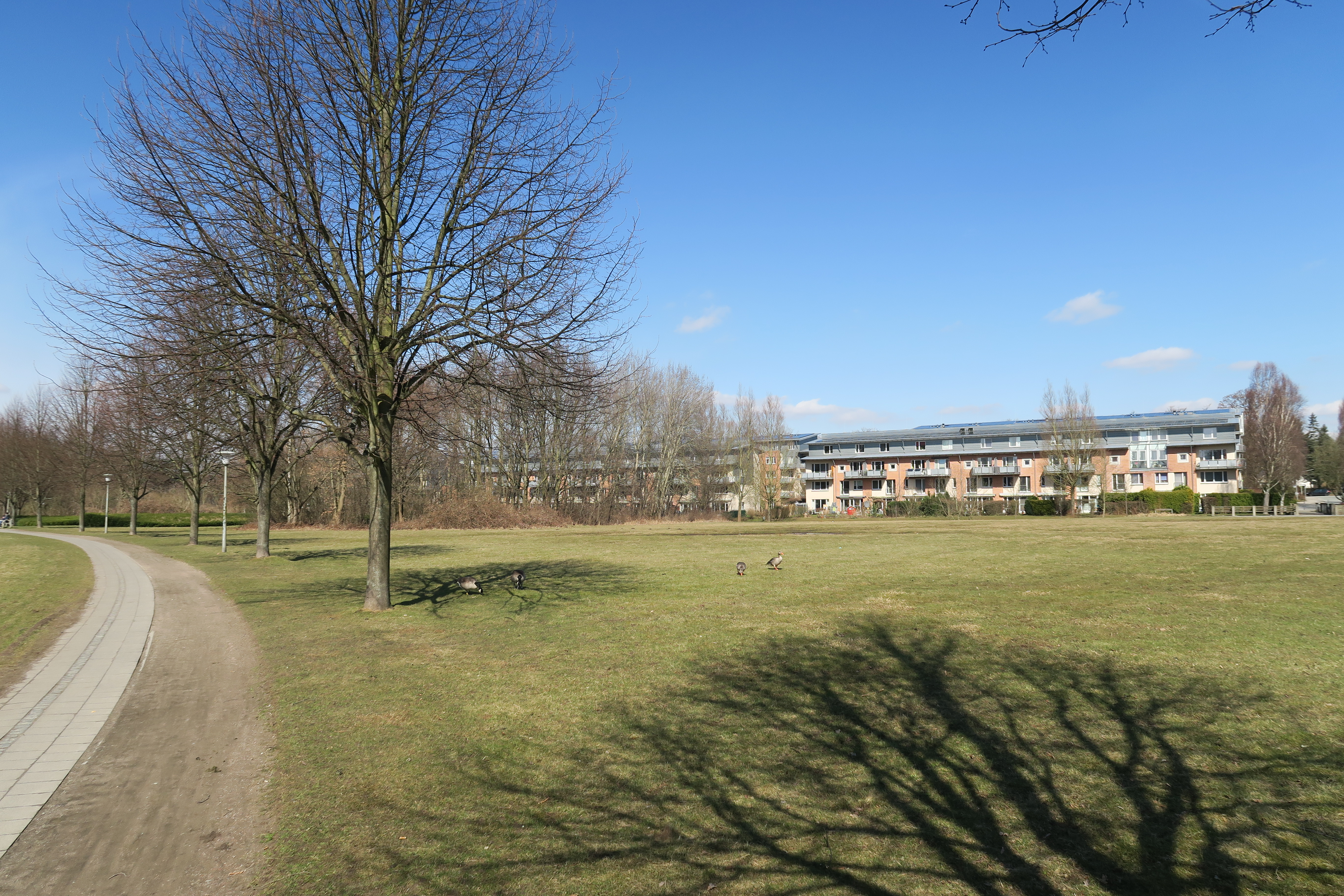 Wohnpark Trabrennbahn Farmsen